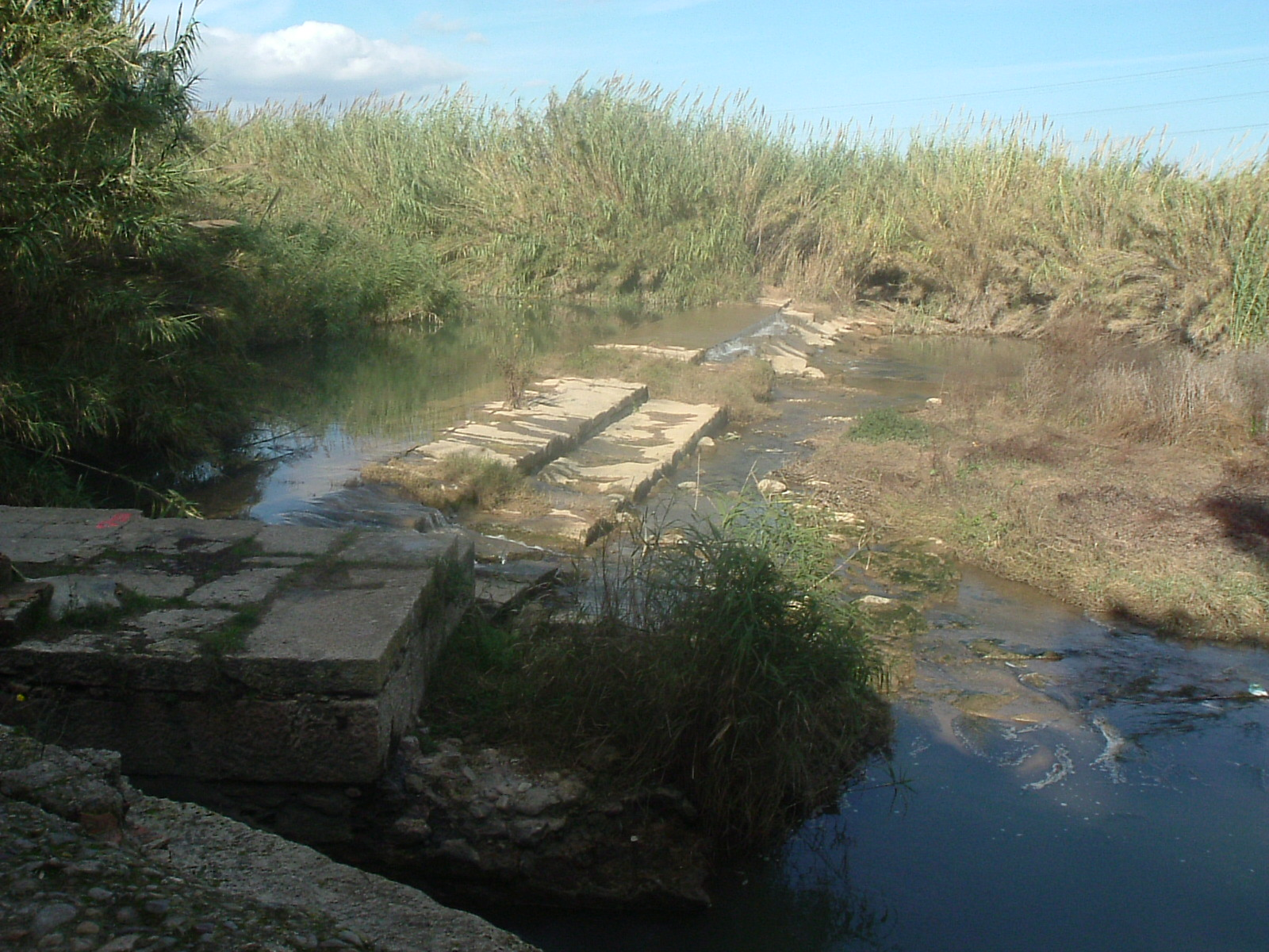 Assut de la séquia de Mislara en el riu Túria